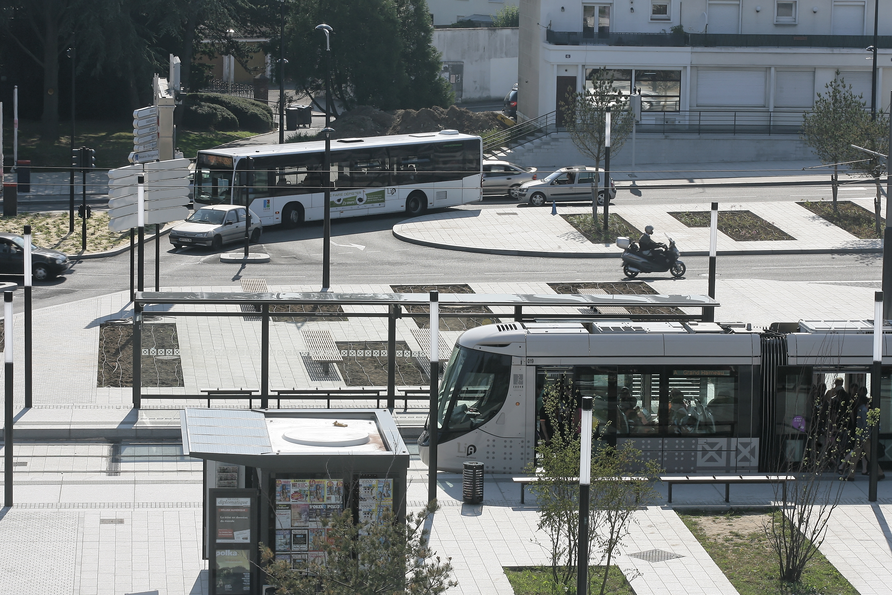 Le Havre, des transports en commun performants